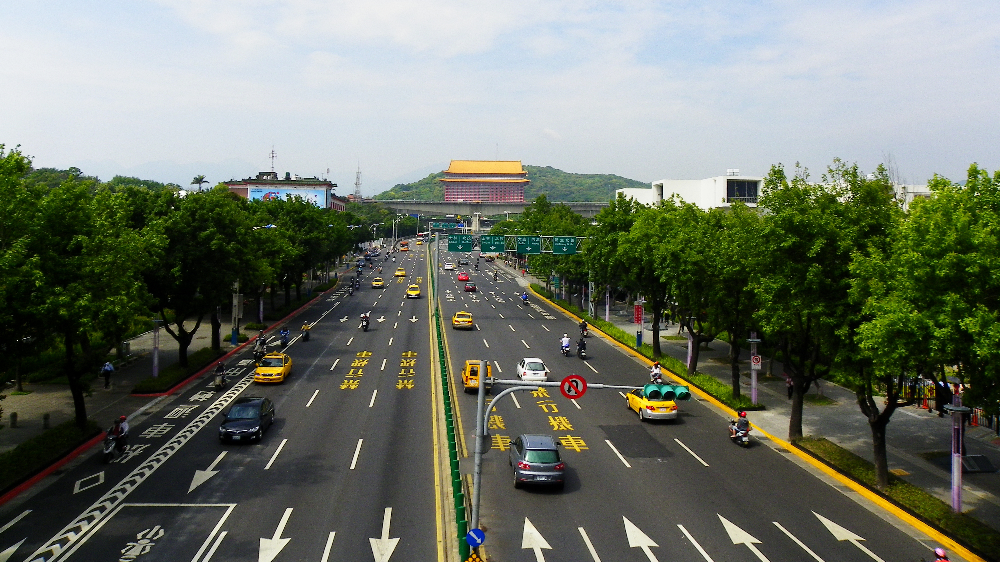 自花博人行陸橋北向俯瞰中山北路三段。